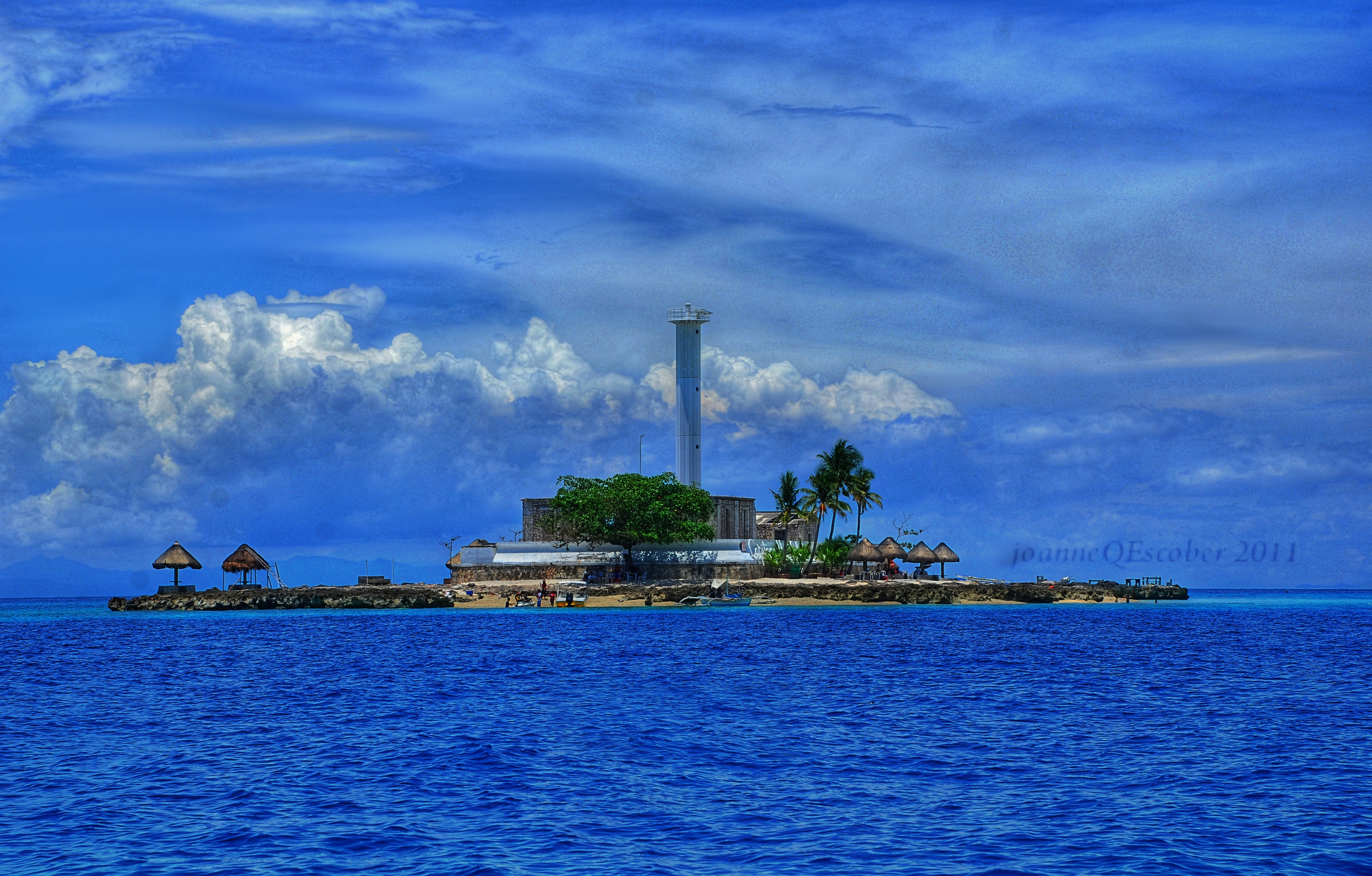 Capitancillo Island, Bogo, Cebu